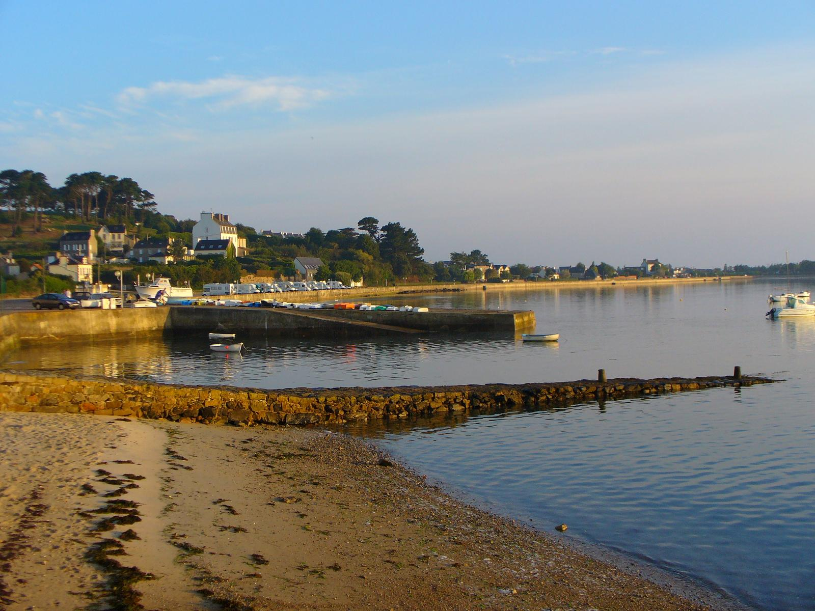 Port de Pempoul à Saint-Pol de Léon (Finistère, France).